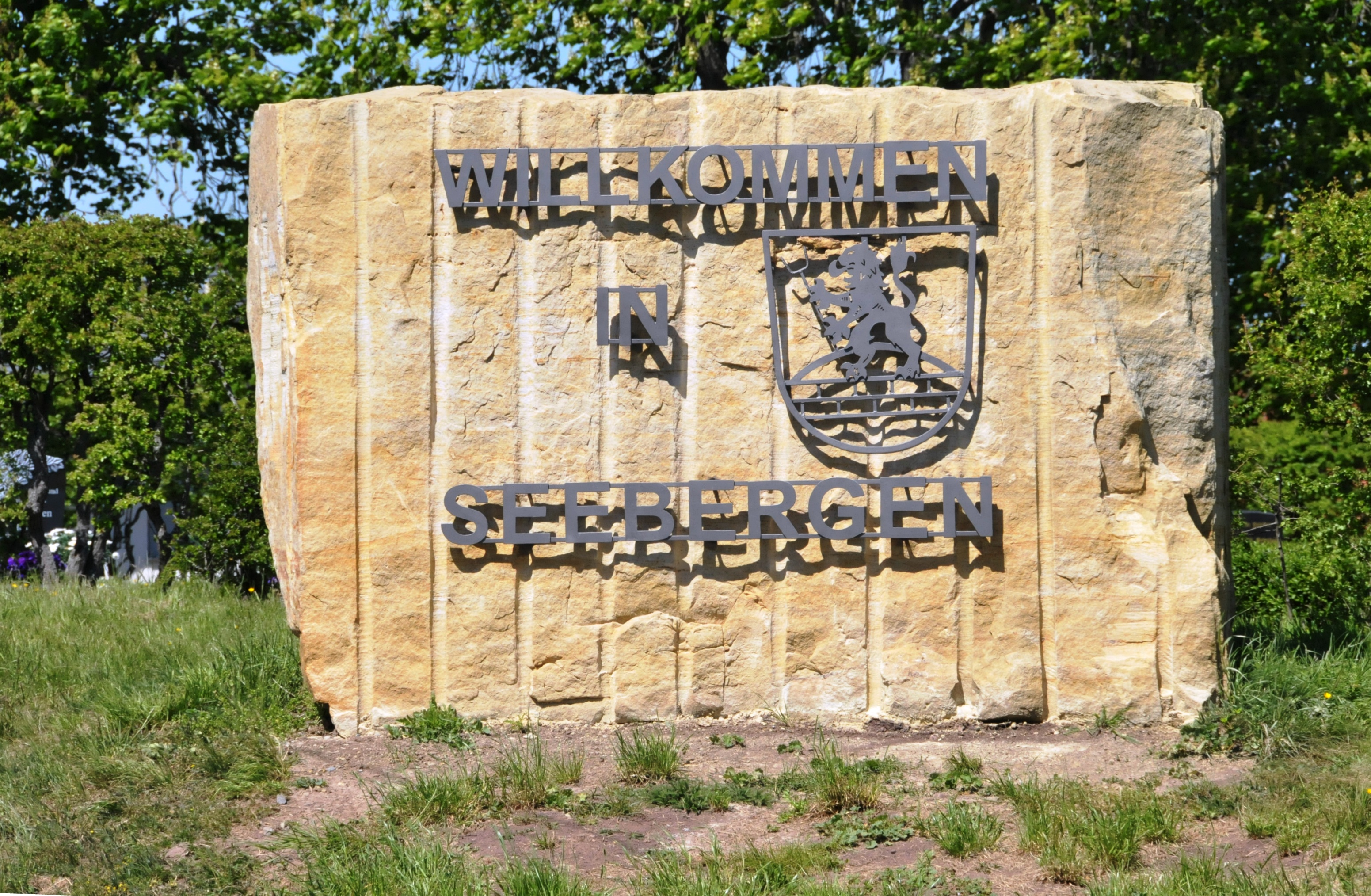 Sandsteinblock mit Willkommensgruß in Seebergen (Drei Gleichen)